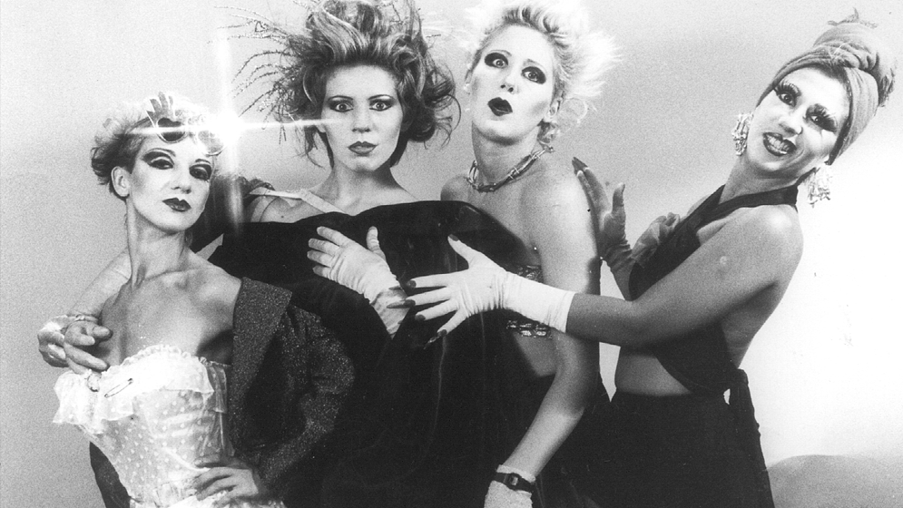 El grupo teatral Gambas al Ajillo, parte de la cultura contracultural underground porteña del Parakultural durante los años ochenta.